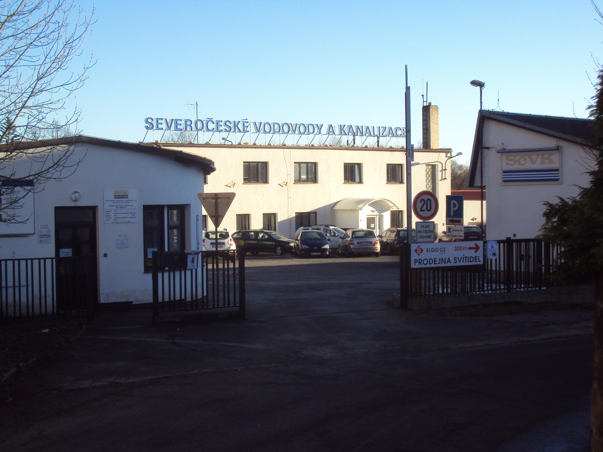 Sídlo českolipské pobočky SEVAKu